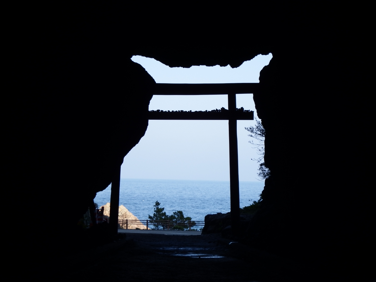 室戸岬の御厨人窟（みくろど)から見た太平洋